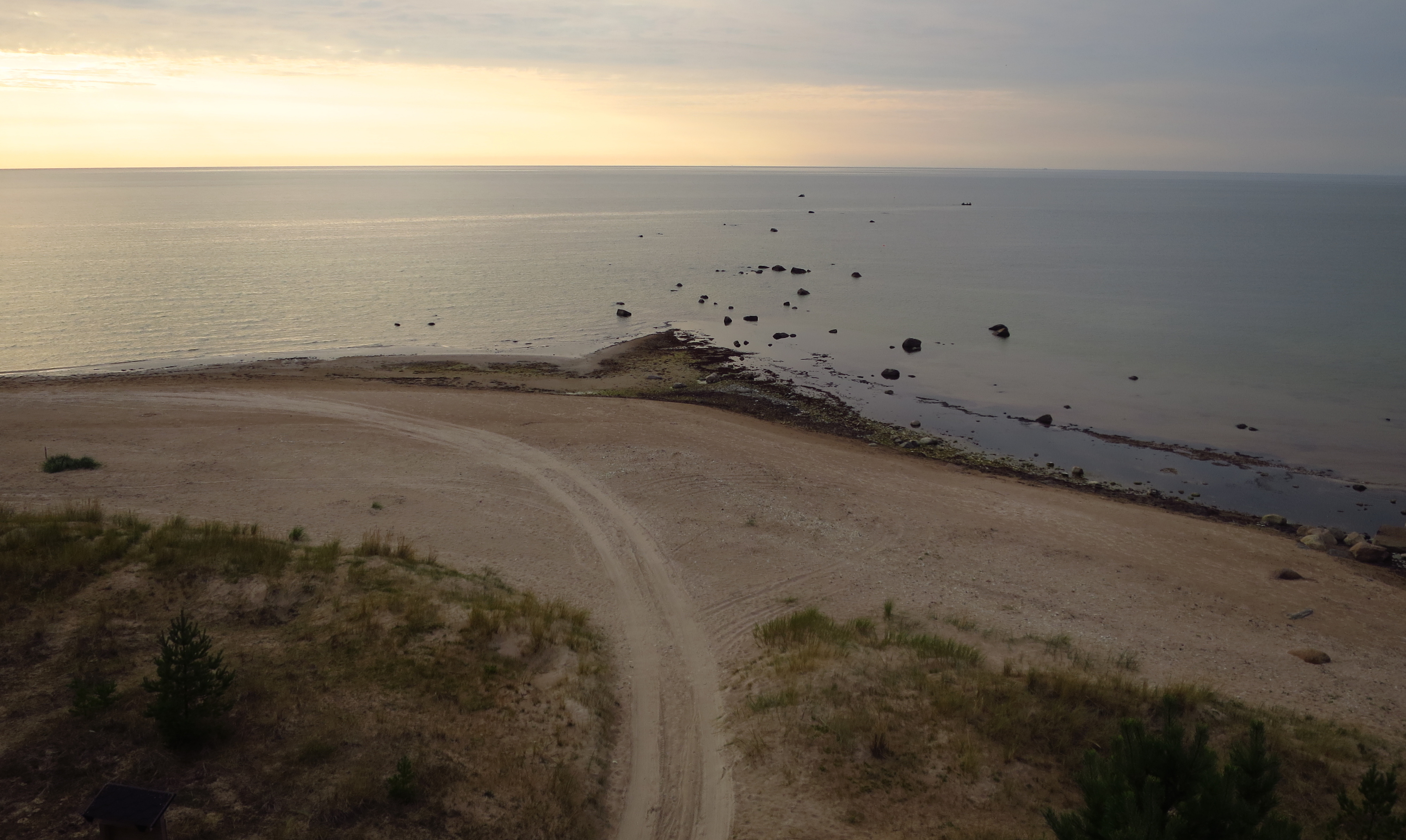 Palli nina Hiiumaal